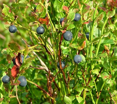 Vaccinium myrtillus